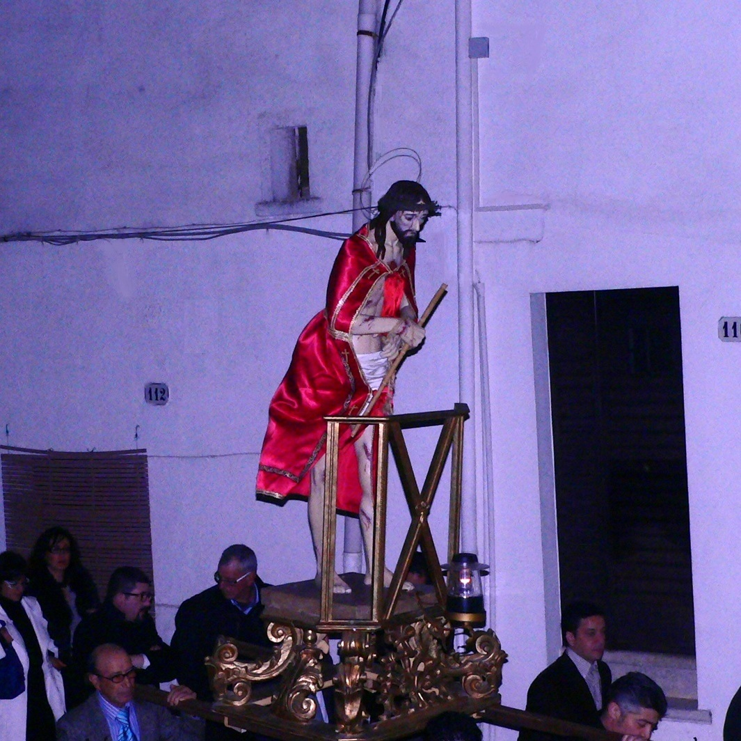 Statua di Cristo alla loggia portata in processione a Ceglie Messapica in occasione della processione dei Misteri.